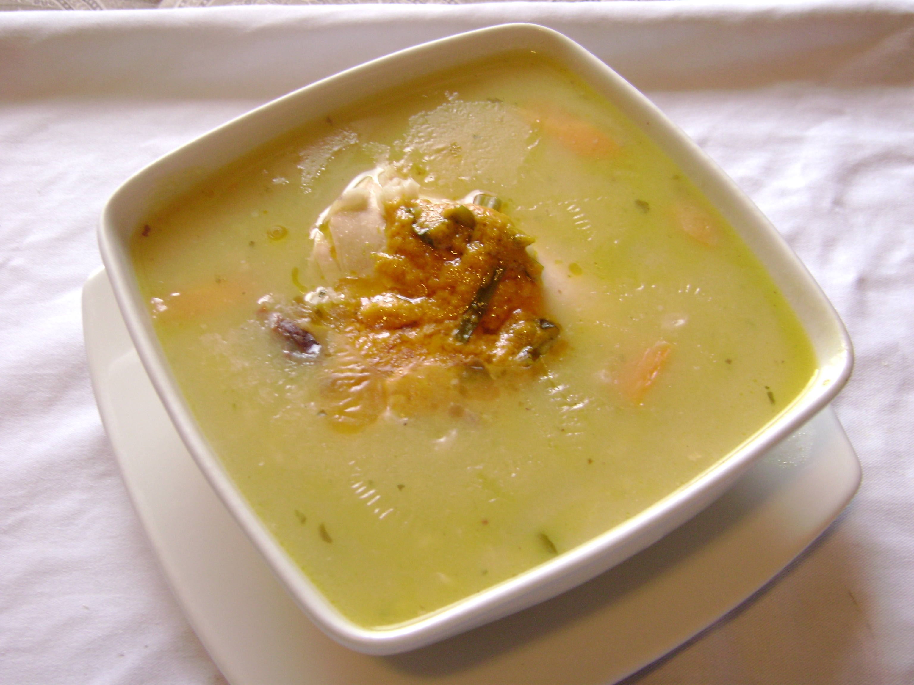 Llunca de gallina. La llunca es una sopa de trigo. Hotel El Tumi. Huaraz, Ancash. Perú.